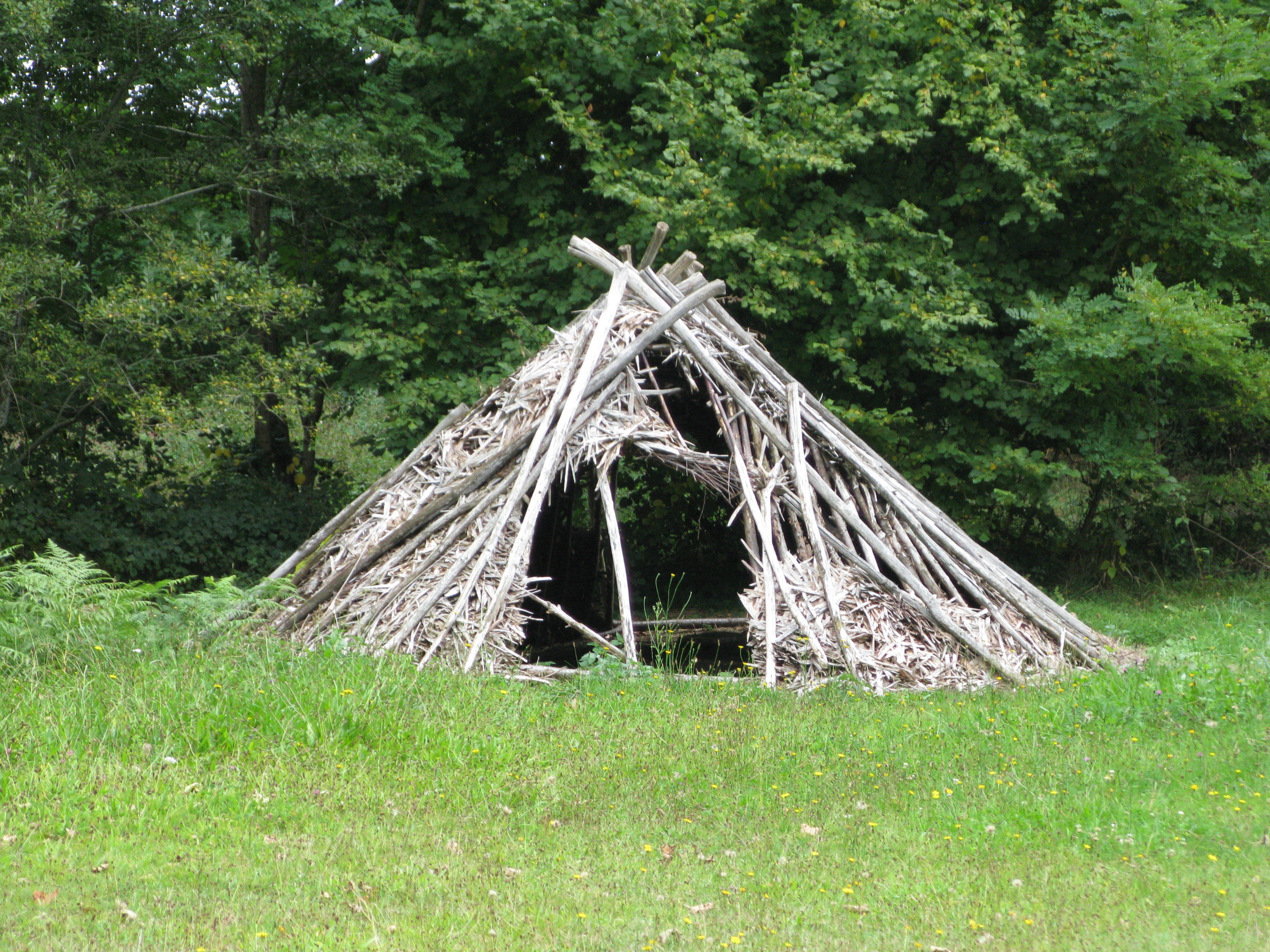 Photo d'une loge de feuillardier, prise près du château de Montbrun, à Dournazac.